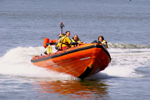 De zojuist gedoopte Veronica in haar element